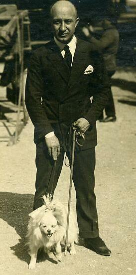 Vittorio Malpassuti - fotoritratto a figura intera Fonte: archivio della famiglia Malpassuti